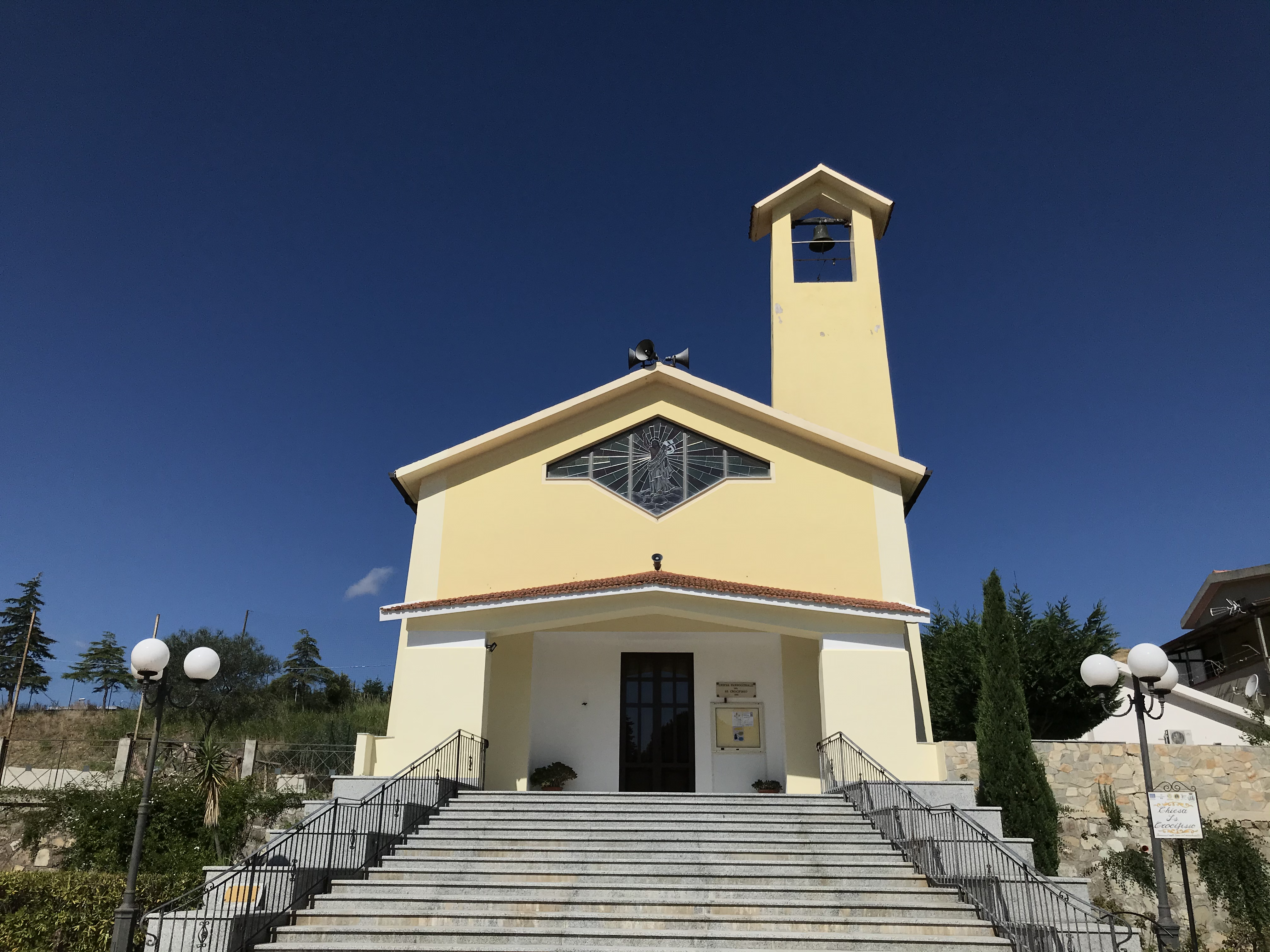 Chiesa del Santissimo Crocifisso a Torre Melissa